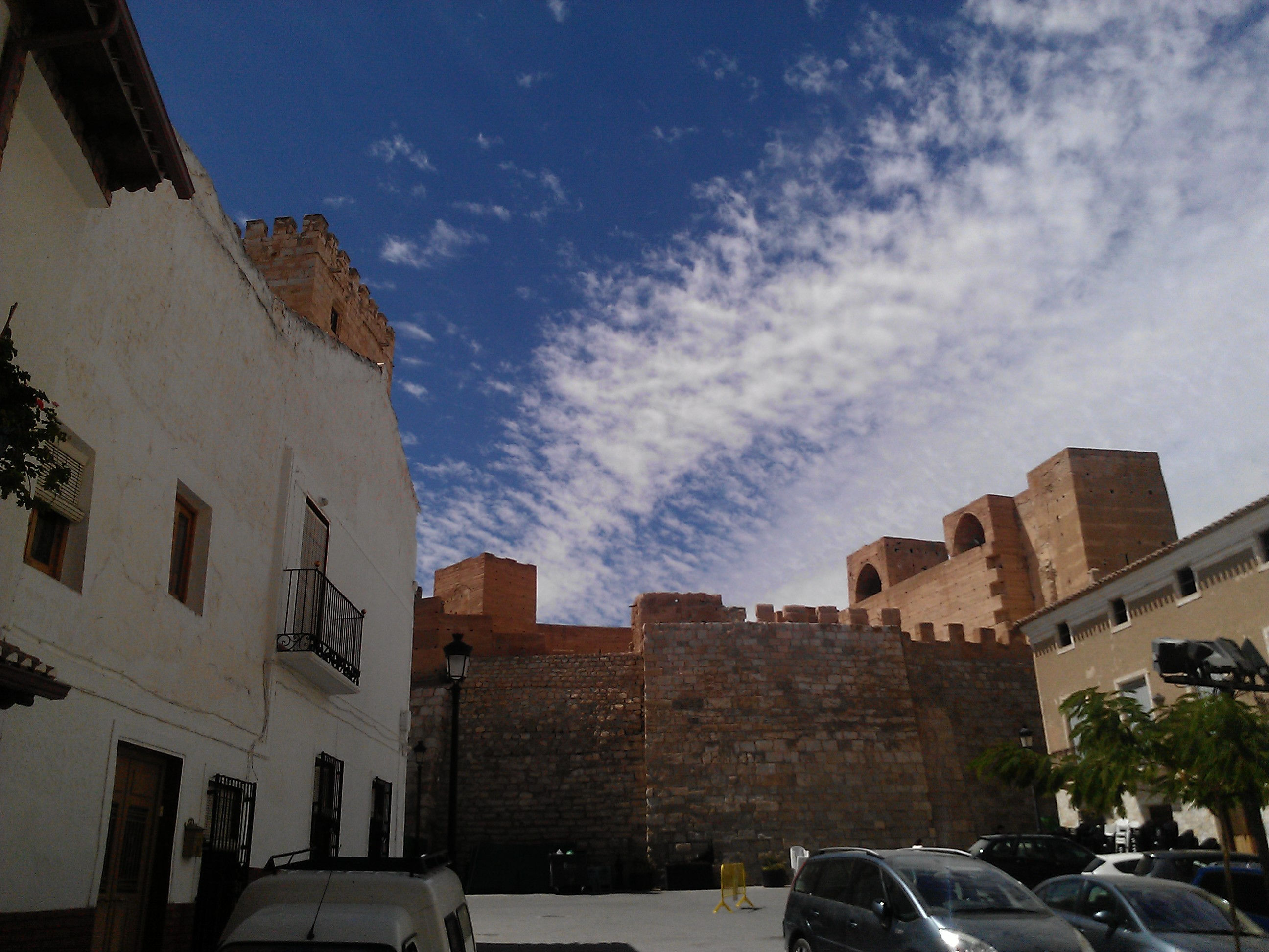 Localidad de Orce